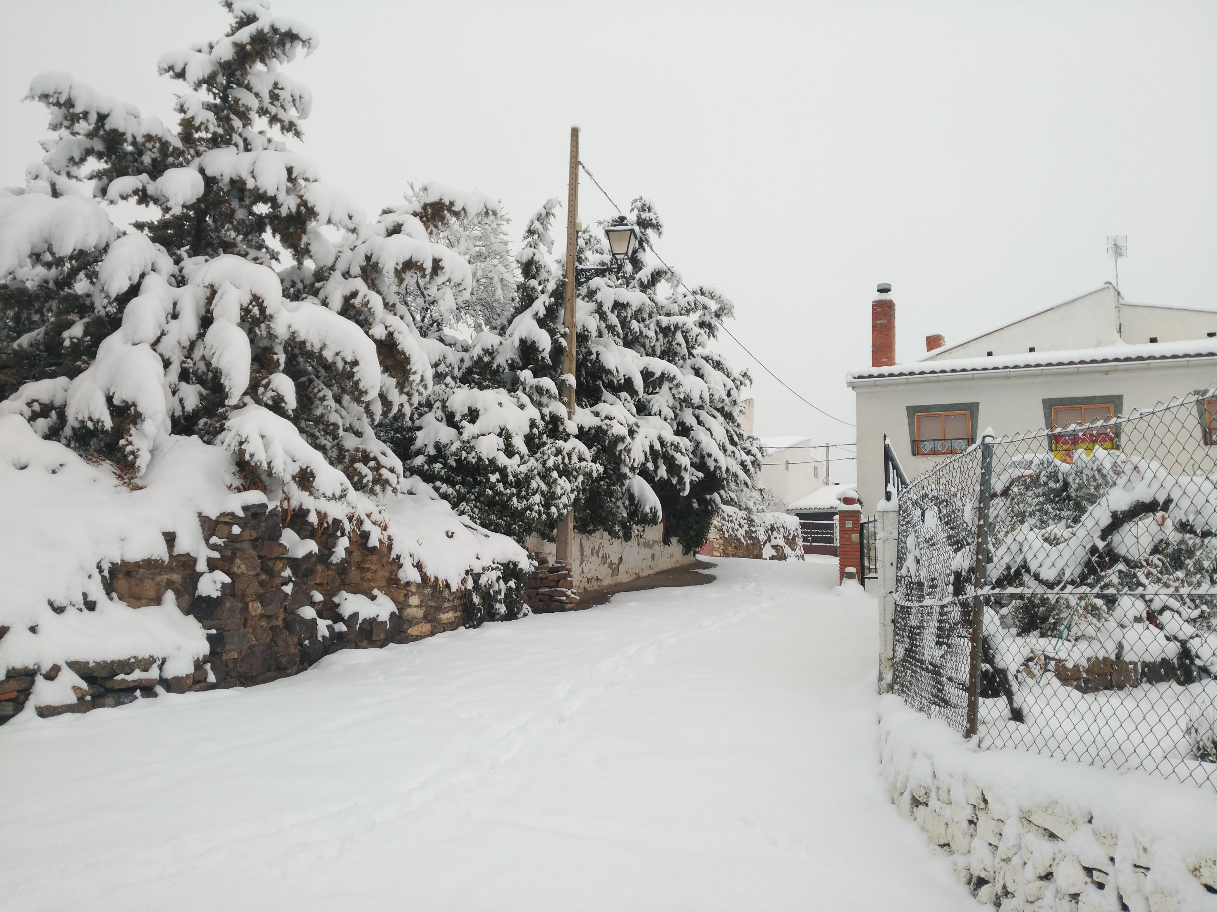 Una calle de Bádenas en invierno con nieve